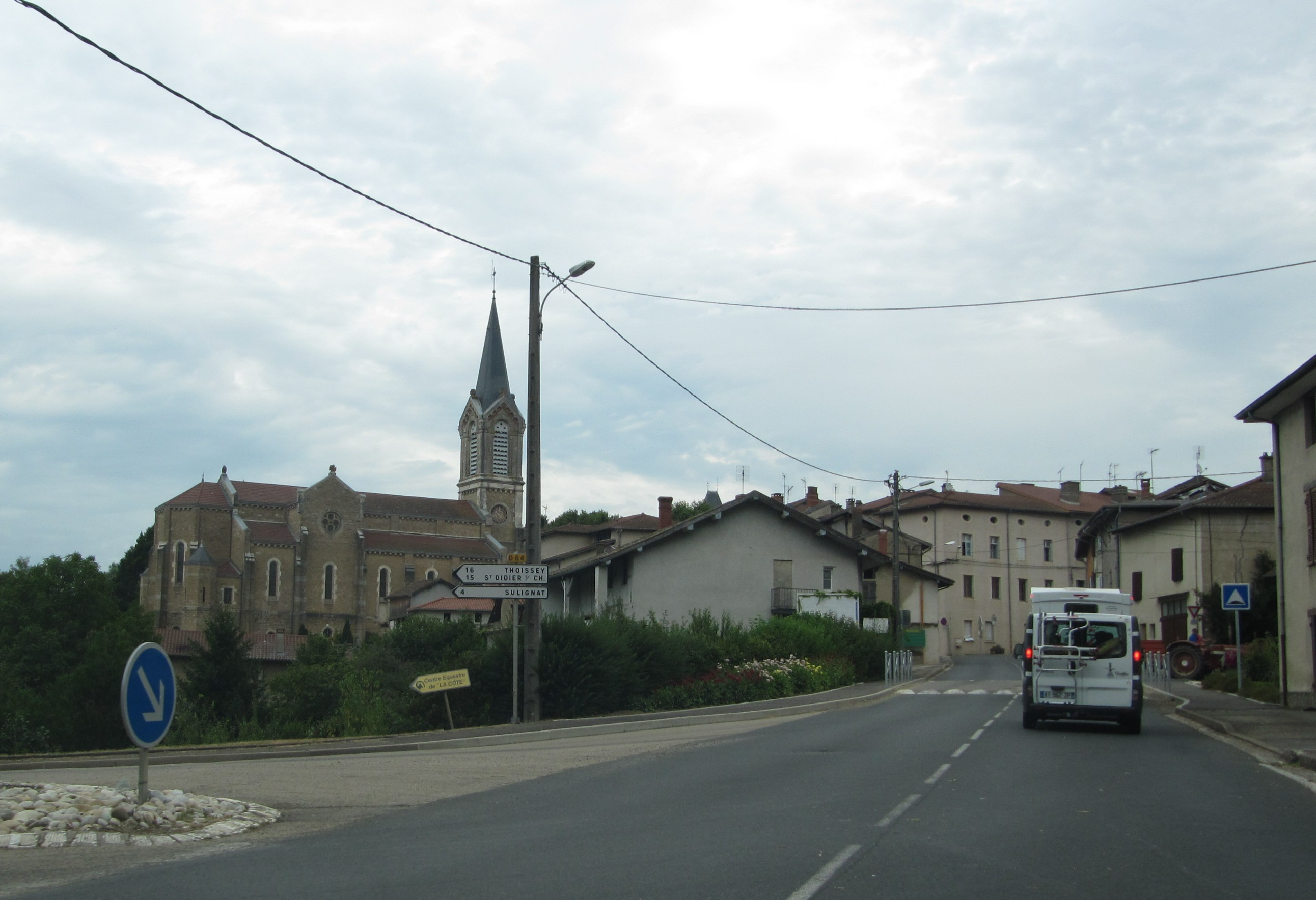 Neuville-les-Dames